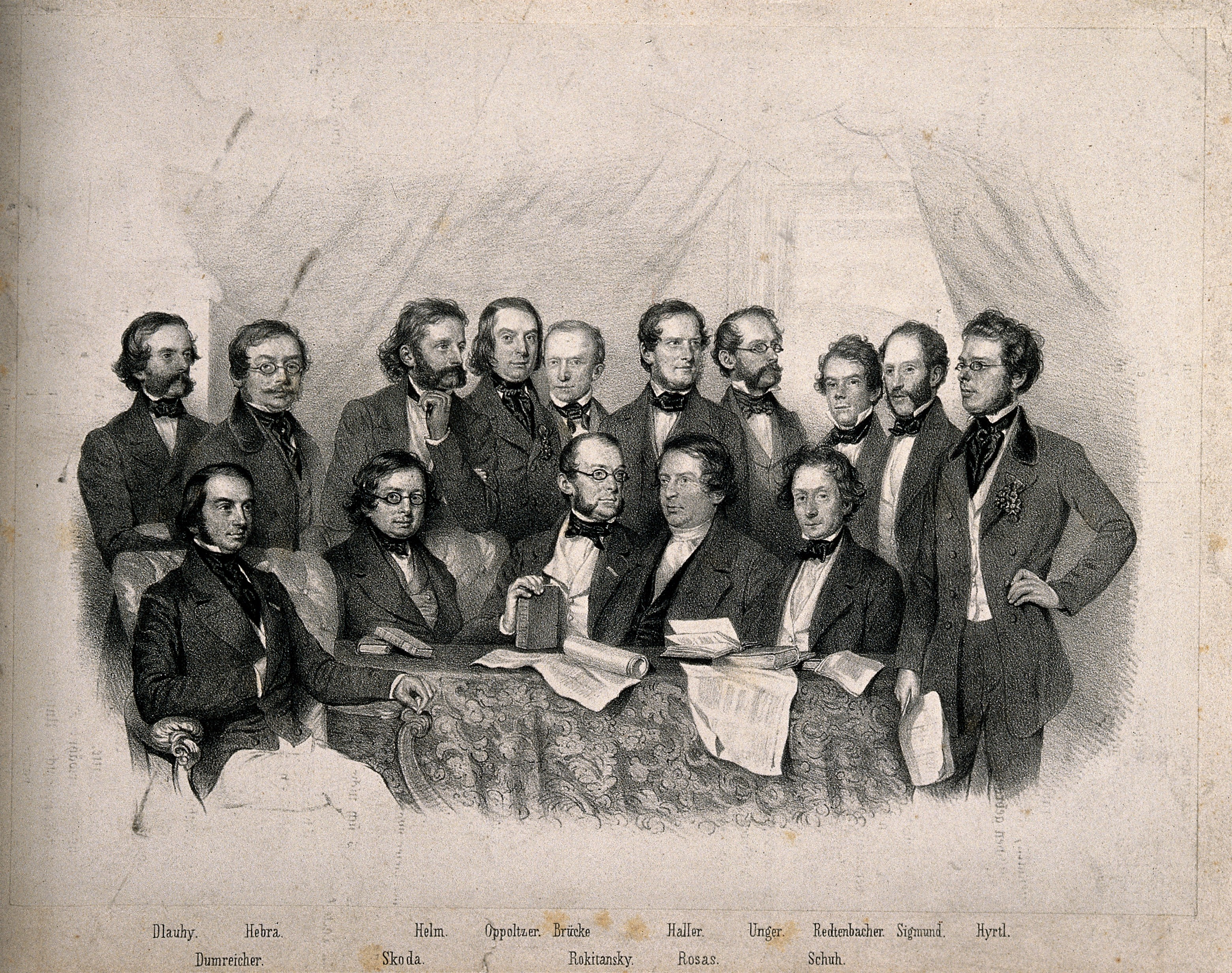 Medical professors at the University of Vienna. Lithograph by J. Stadler, 1855, after A. Prinzhofer, 1853. Iconographic Collections Keywords: Johann Oppolzer; J. H. von. Dumreicher; J. Stadler; Carl Sigmund; Ernst Wilhelm von Brücke; Joseph Skoda; Ferdinand Hebra; Auguste Prinzhofer; Anton Edler von Rosas; Joseph Redtenbacher; Theodor Helm; Johann Dlauhy; C. Haller; Karl von Rokitansky; F. Unger; Franz Schuh